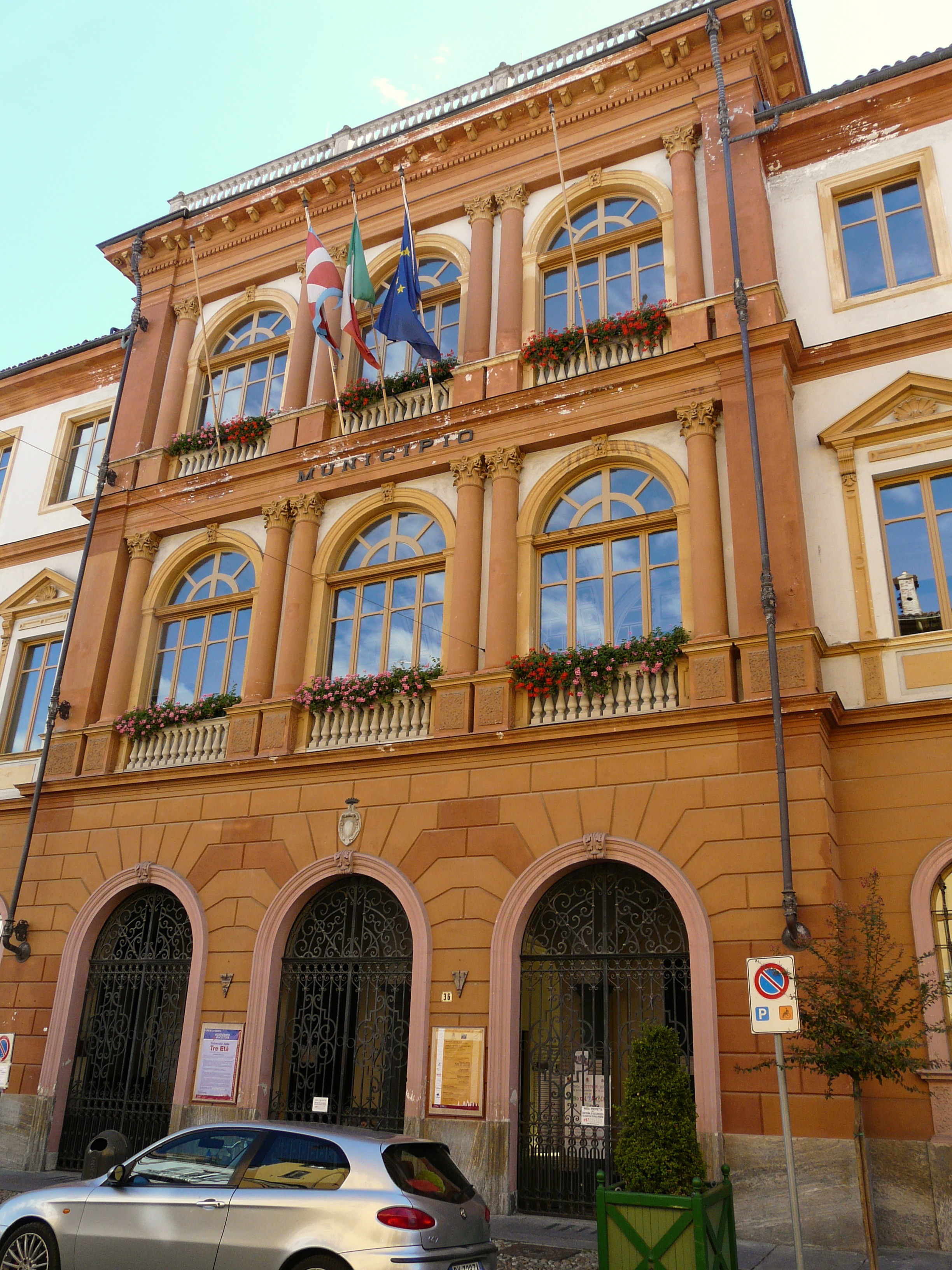 Municipio di Savigliano, Piemonte, Italia